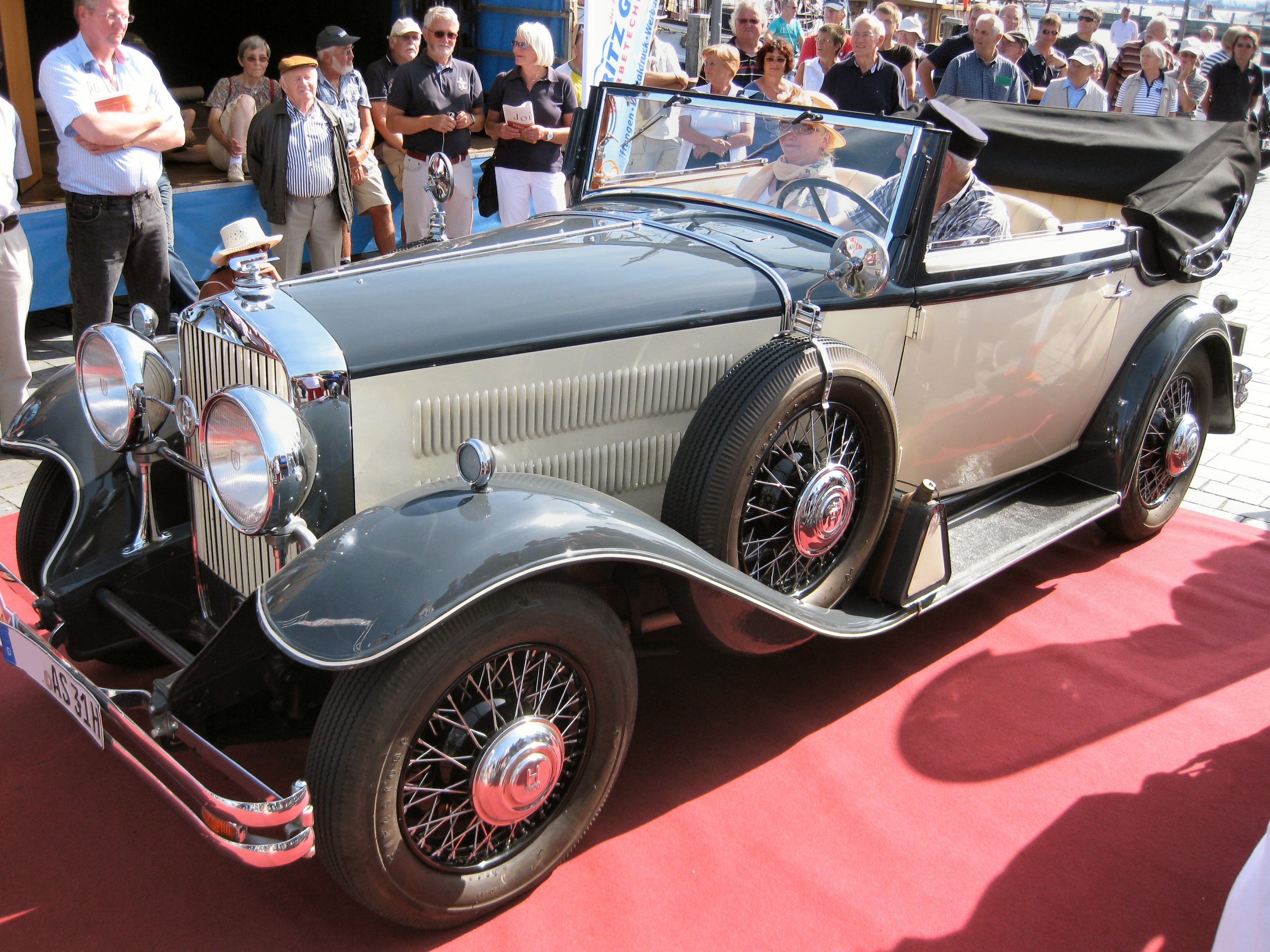 Horch 420 Cabrio (1931)